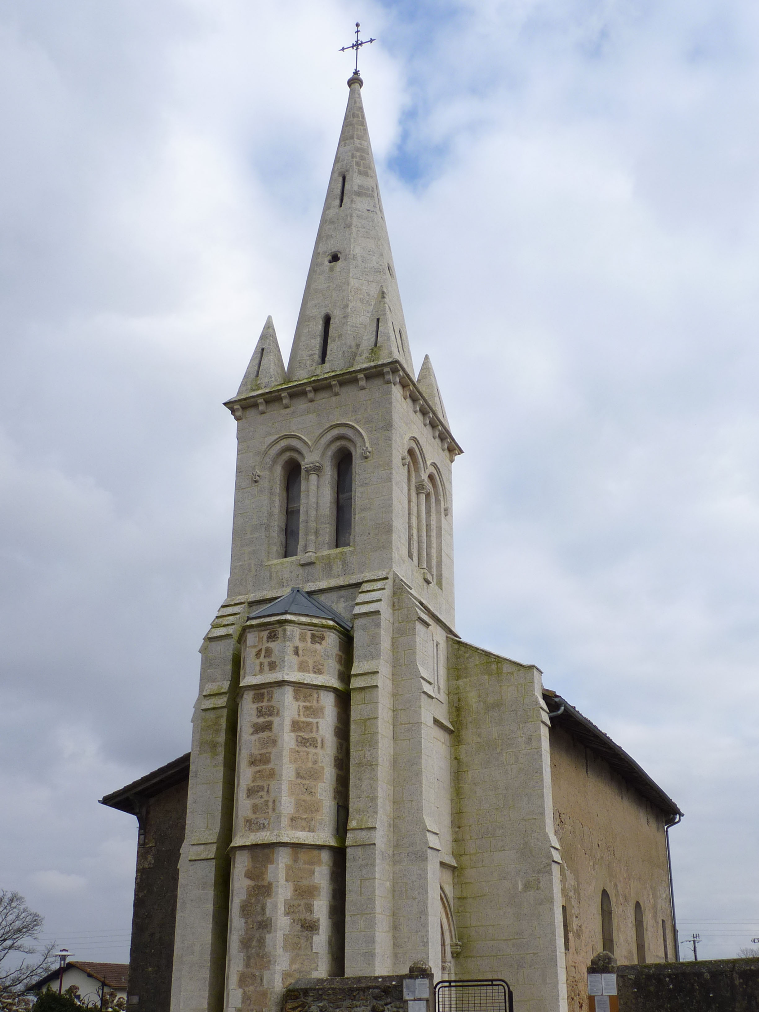 Église Notre-Dame d'Onard (40).